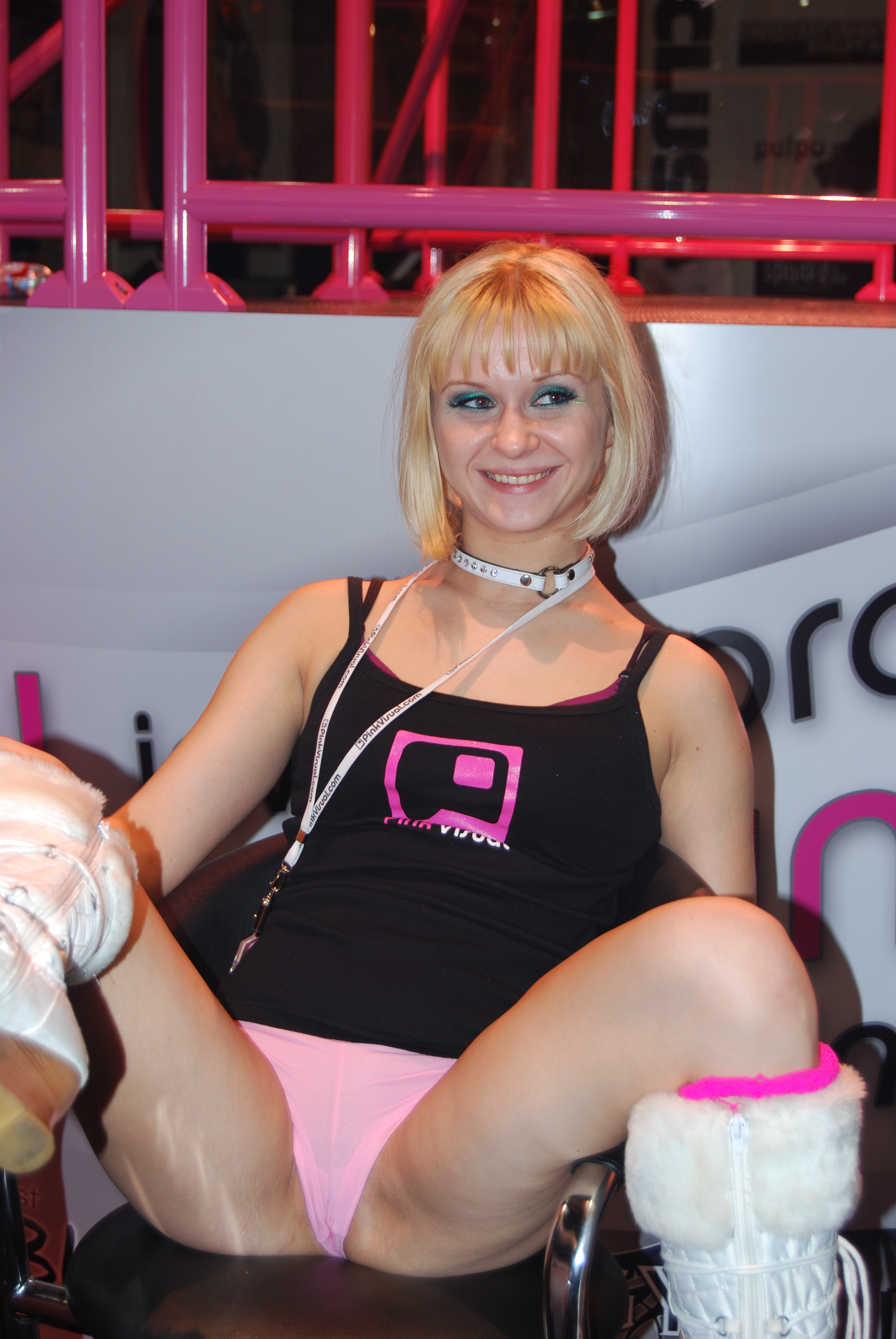 AEE2008_Nikon_Day2 646